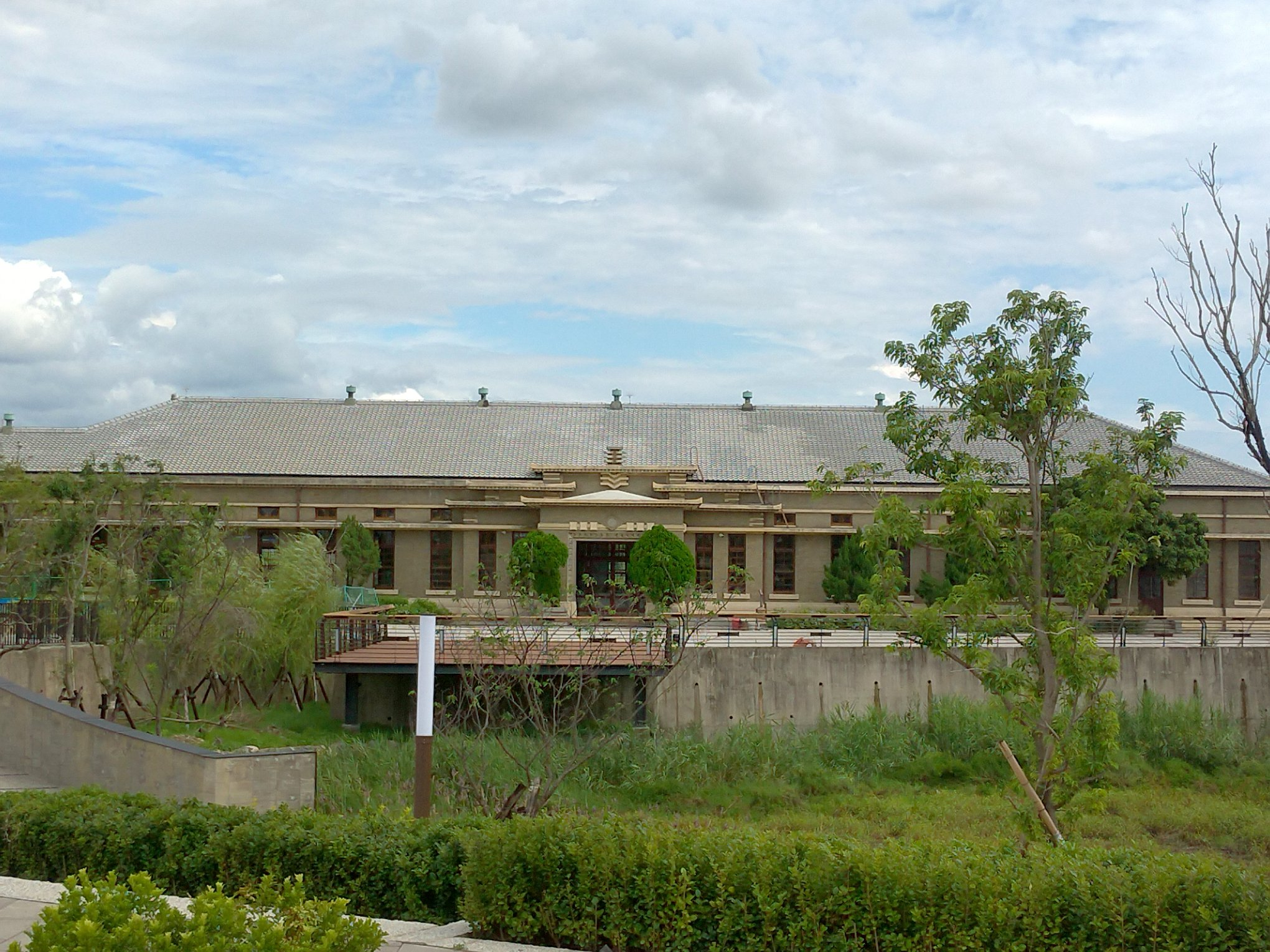 帝國糖廠整修後照片